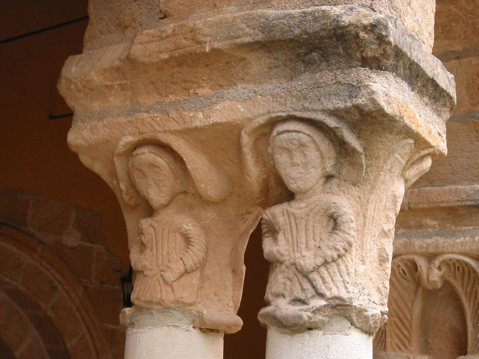 Iglesia Saúca. Detalle capitel (Saúca, Guadalajara)